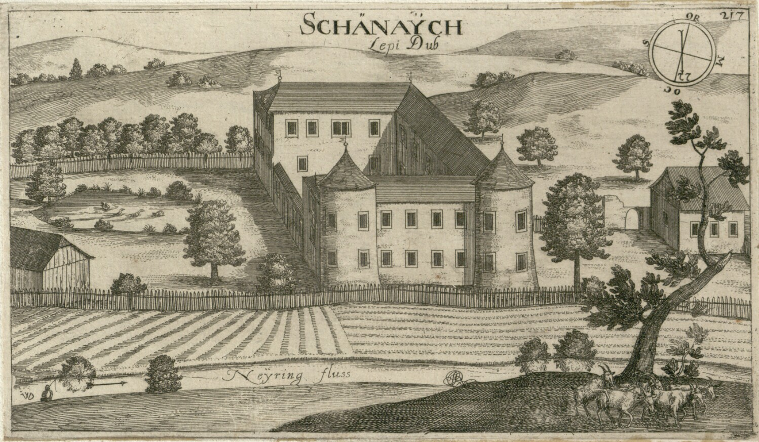 Lepi dob